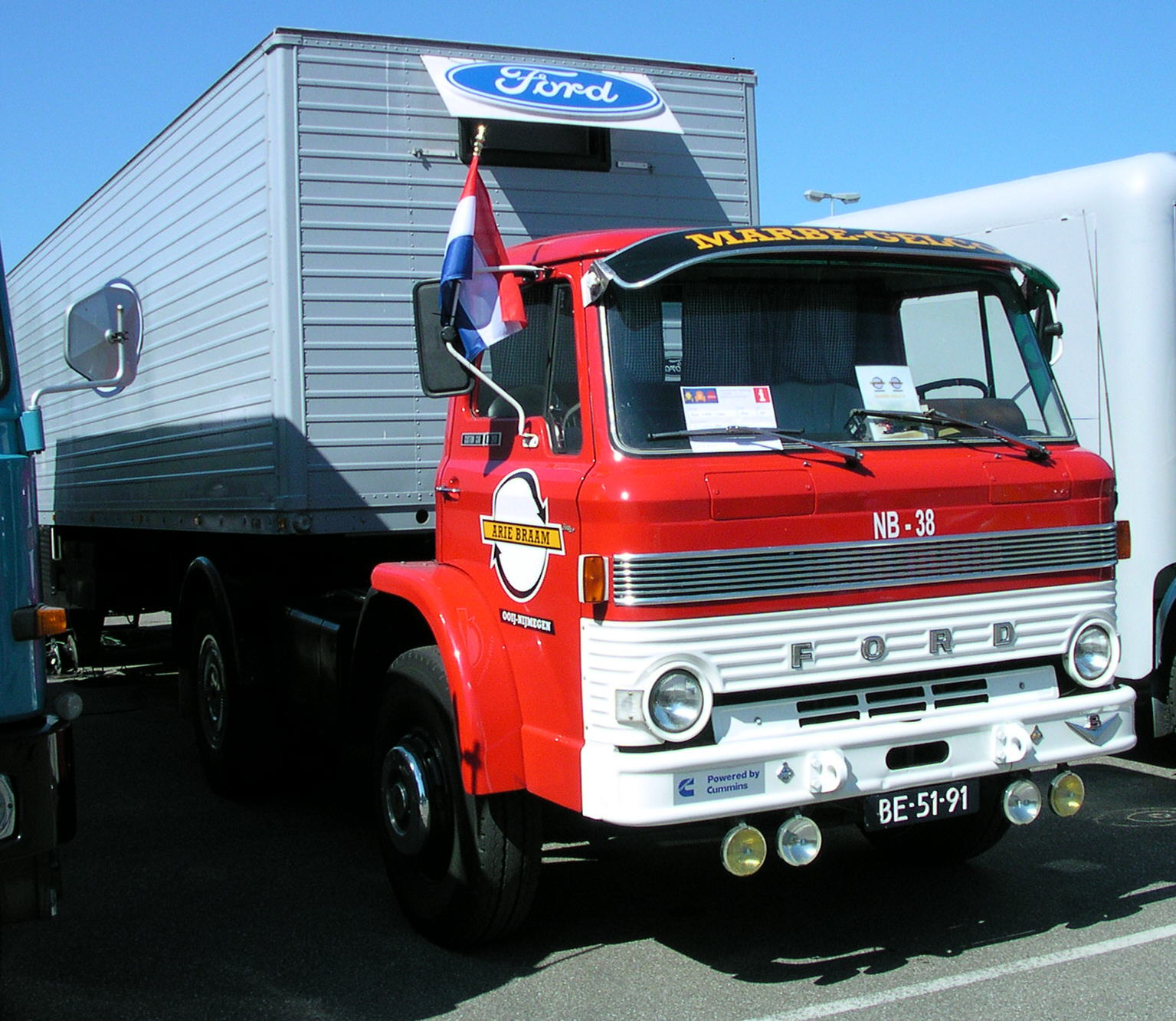 Ford N Sattelzugmaschine mit Cummings Dieselmotor in Wörth am Rhein beim Oldtimer-Treffen bei Daimler-Chrysler